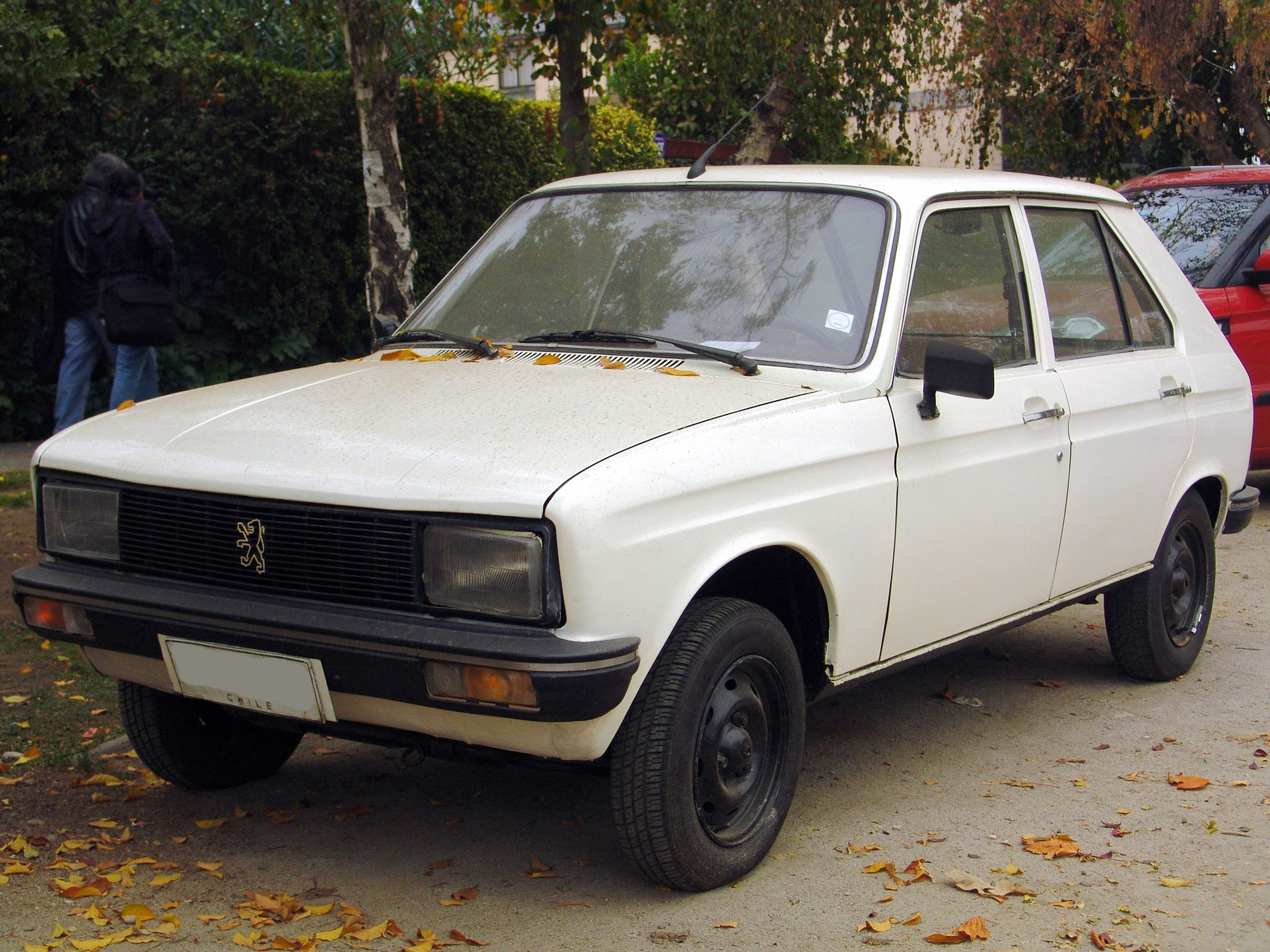 Peugeot 104 GR 1982